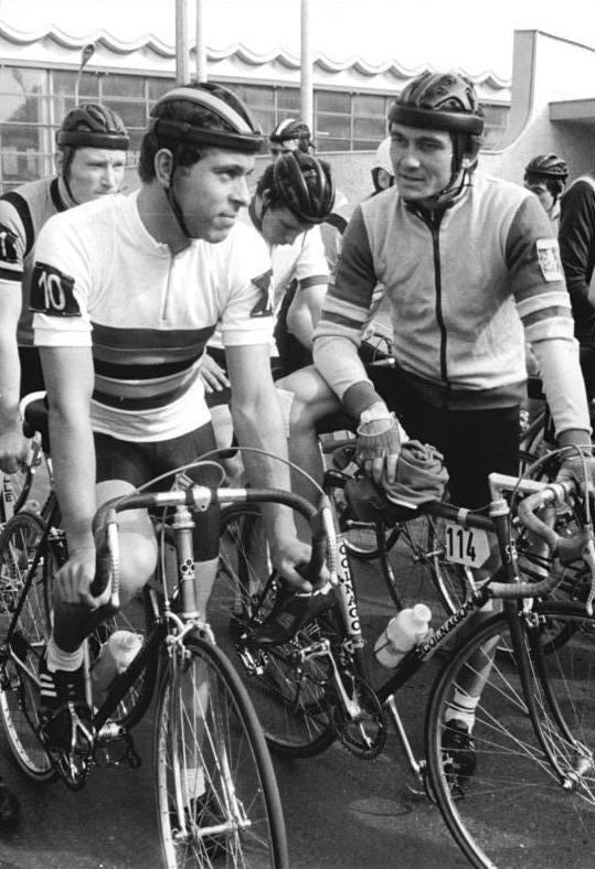 Uwe Raab, Thomas Barth ADN-ZB Senft 21.4.84 Berlin: 27. Erich-Schulz-Gedenkrennen Berlin-Angermünde-Berlin über 165 km - Kurz vor dem Start vor der Werner-Seelenbinder-Halle im Gespräch : der spätere Spurtsieger Weltmeister Uwe Raab (SC DHfK Leipzig-links) und Thomas Barth (SC Wismut Gera)